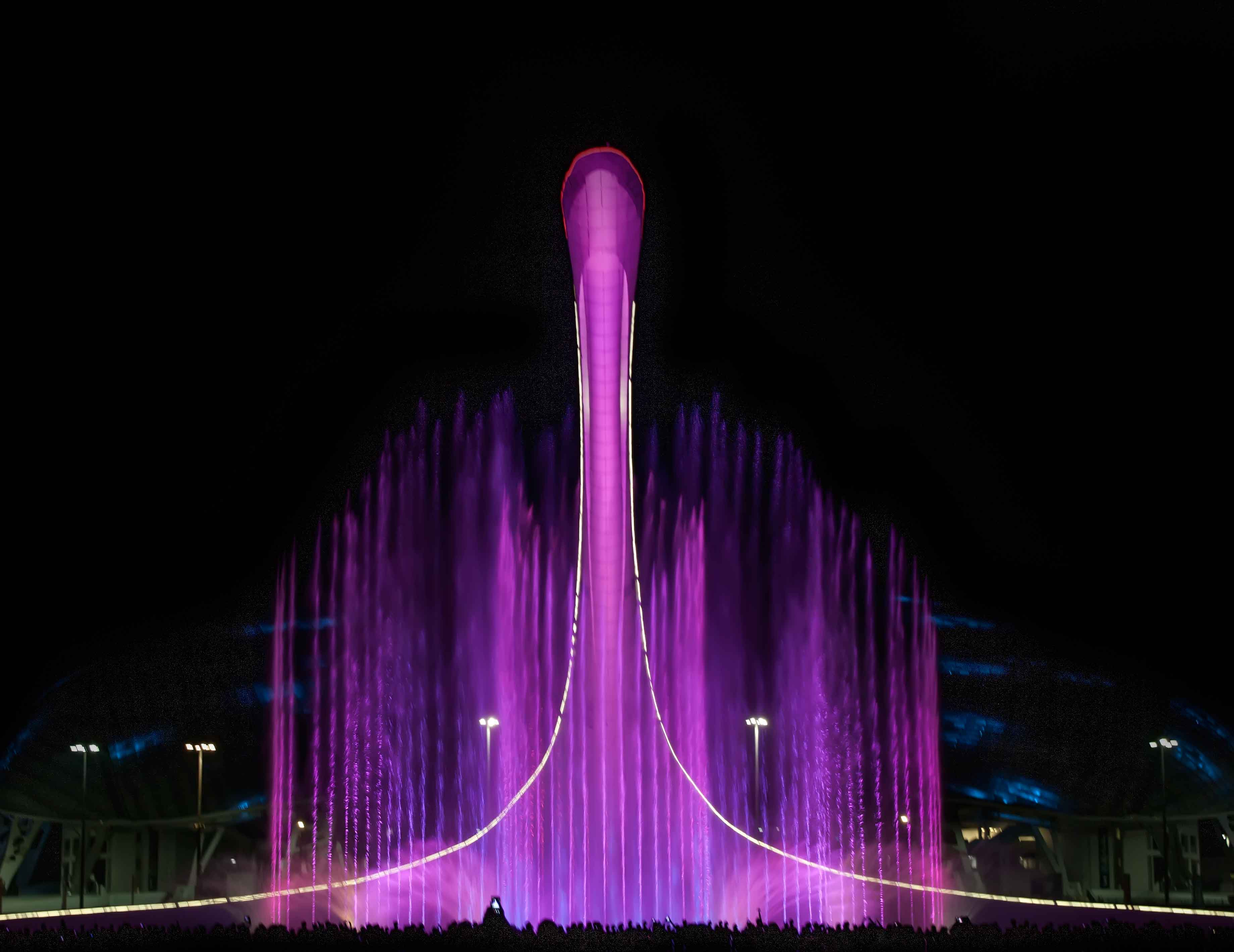 чемпионат фейерверков в сочи